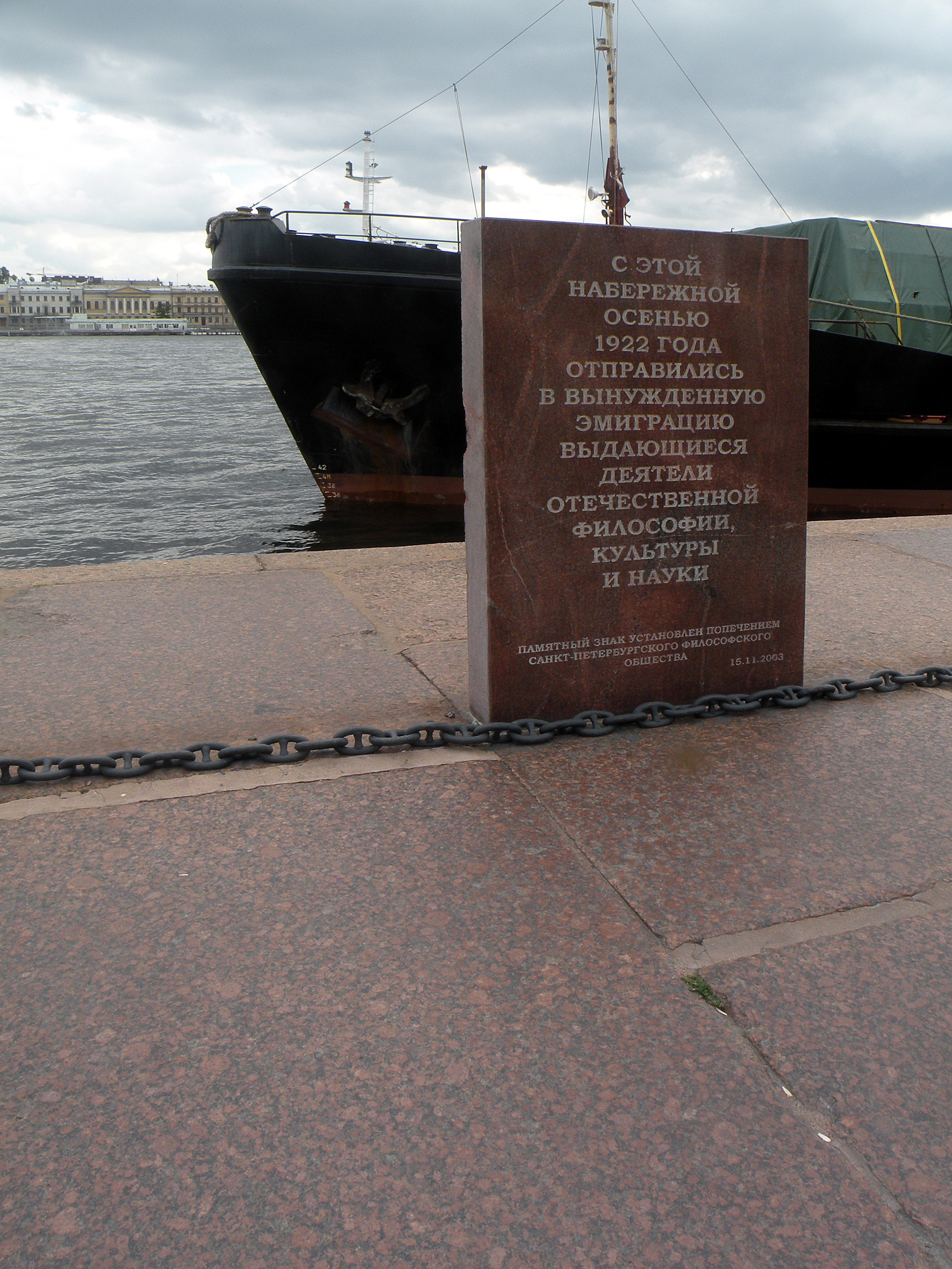 Памятник_Философскому_пароходу.СПб,наб.Невы